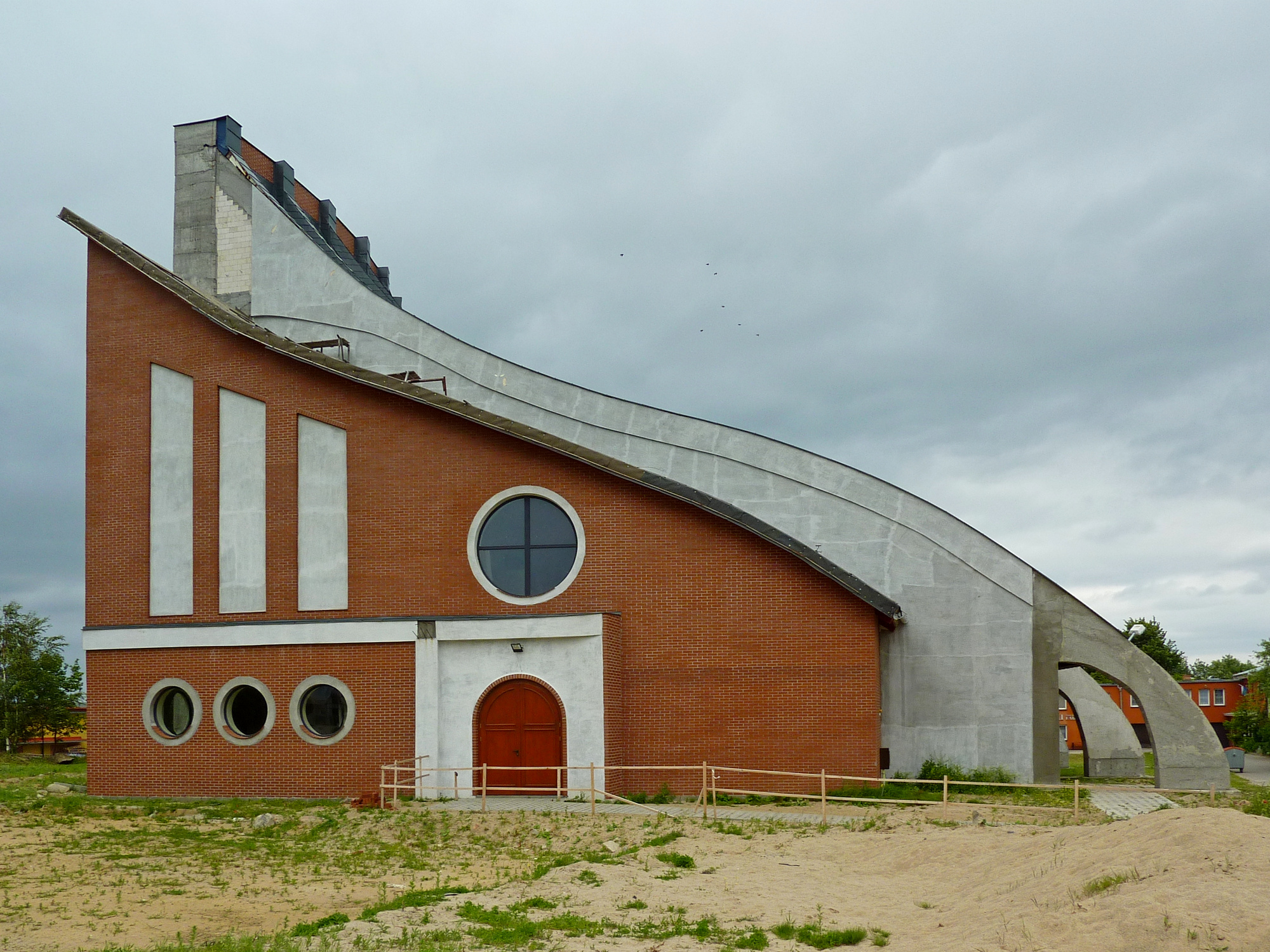 Kościół św. Faustyny Kowalskiej w Pucku.